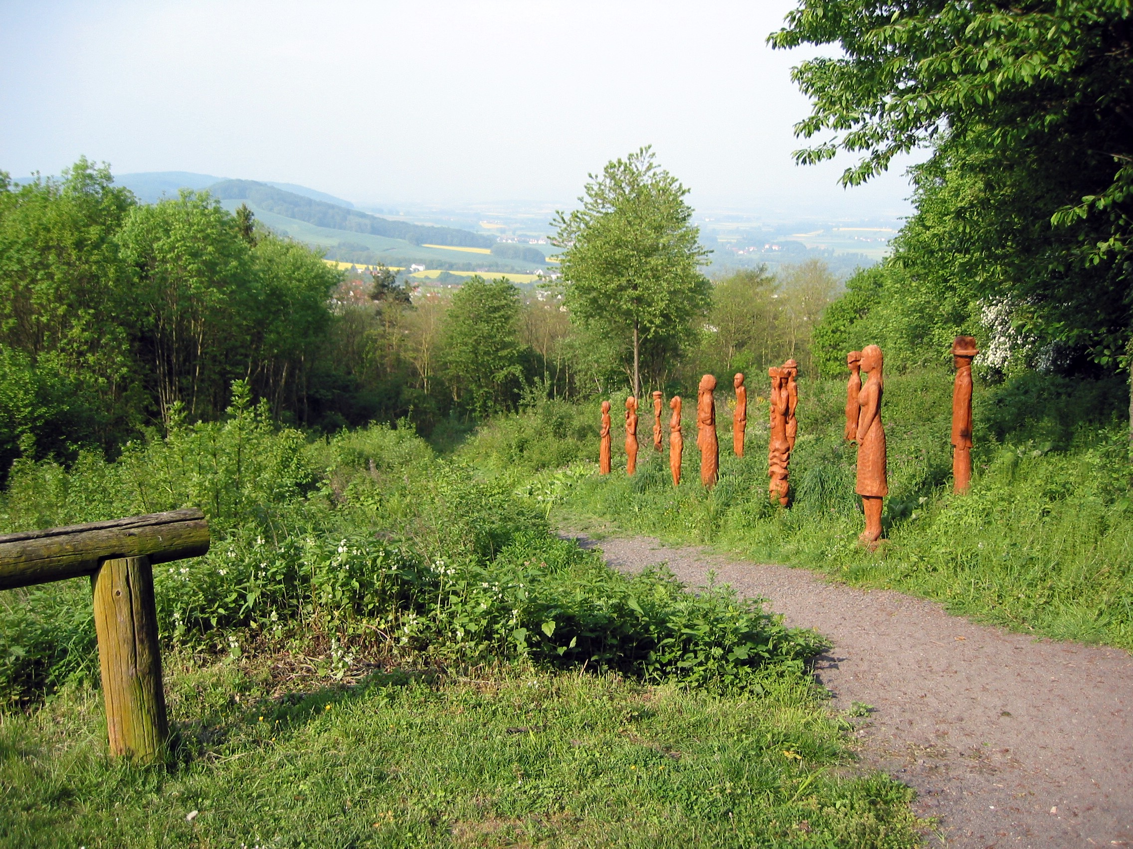 Felsberg (Hesse) Heiligenberg